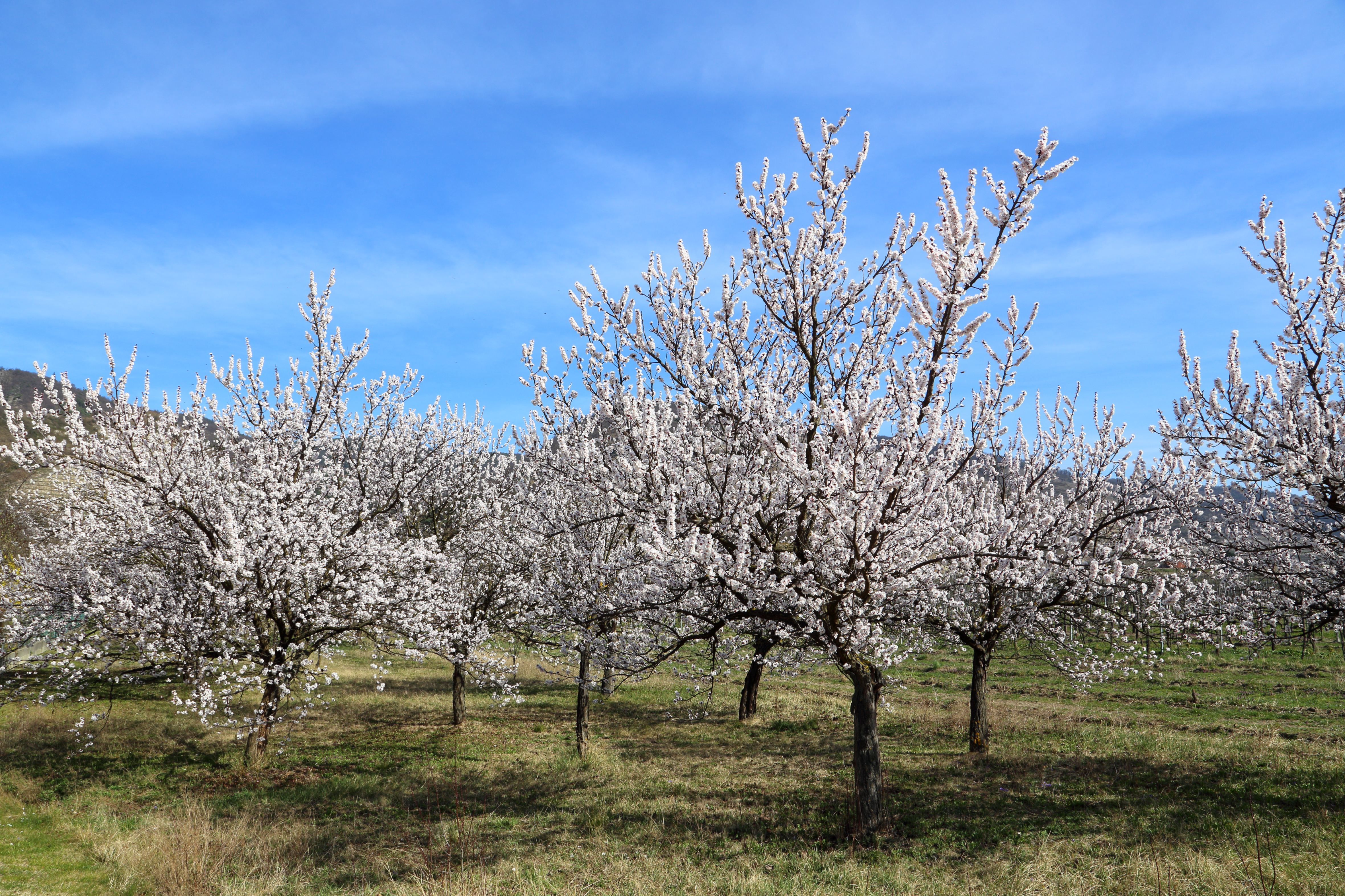 Aprikosenblüte bzw. Marillenblüte in der Wachau (März 2014). Fotografiert in Oberloiben, ein Ortsteil der niederösterreichischen Stadt Dürnstein.